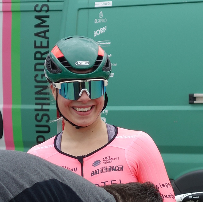 Janine van der Meer (Parkhotel Valkenburg) bij de proloog op het Tom Dumoulin Bike Park in Sittard in de Boels Ladies Tour 2019